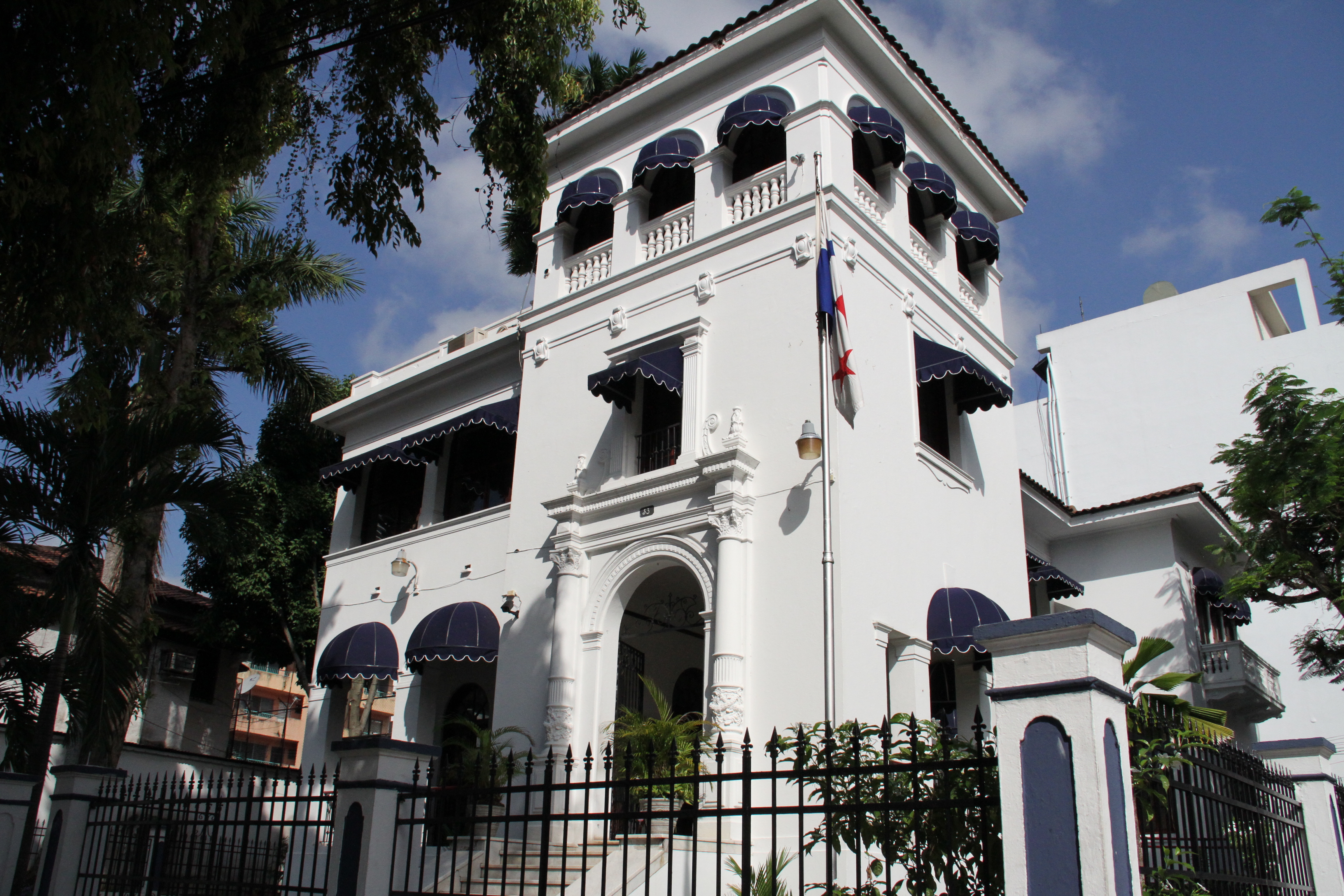 Procuraduría General de la Nación, Edificio Porras, Panamá